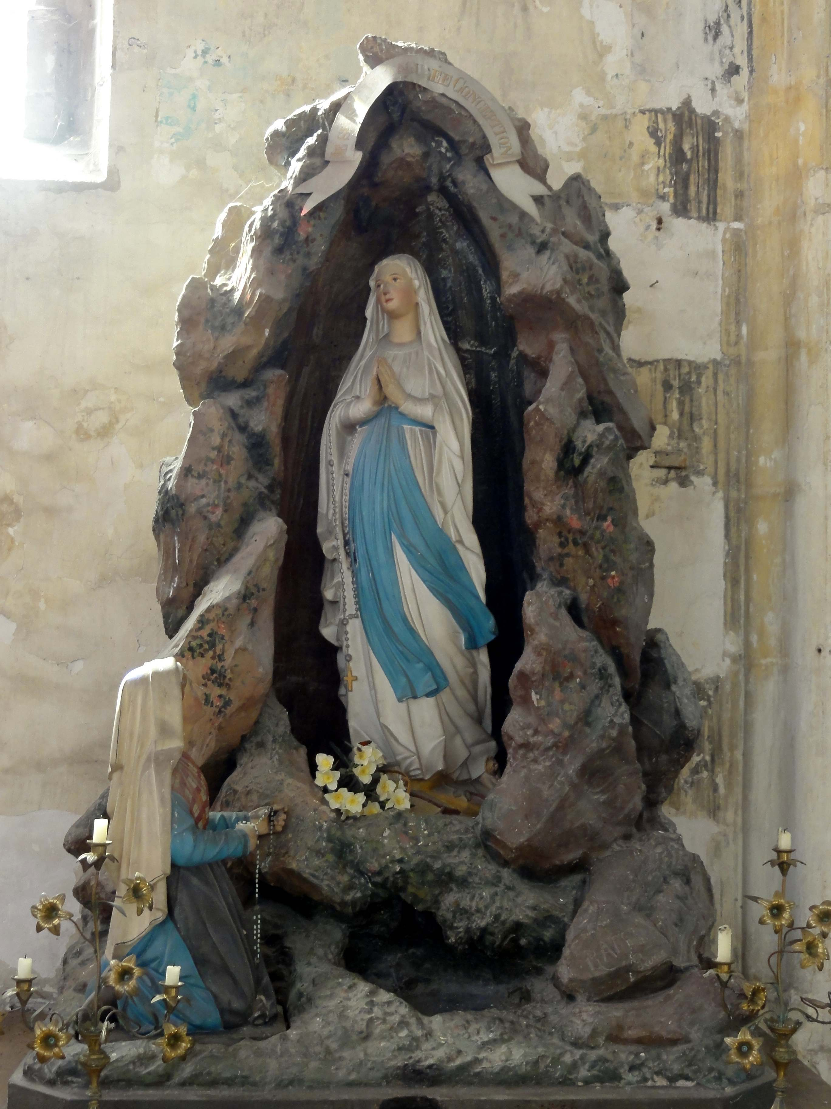 Mobilier de l'église (voir titre).